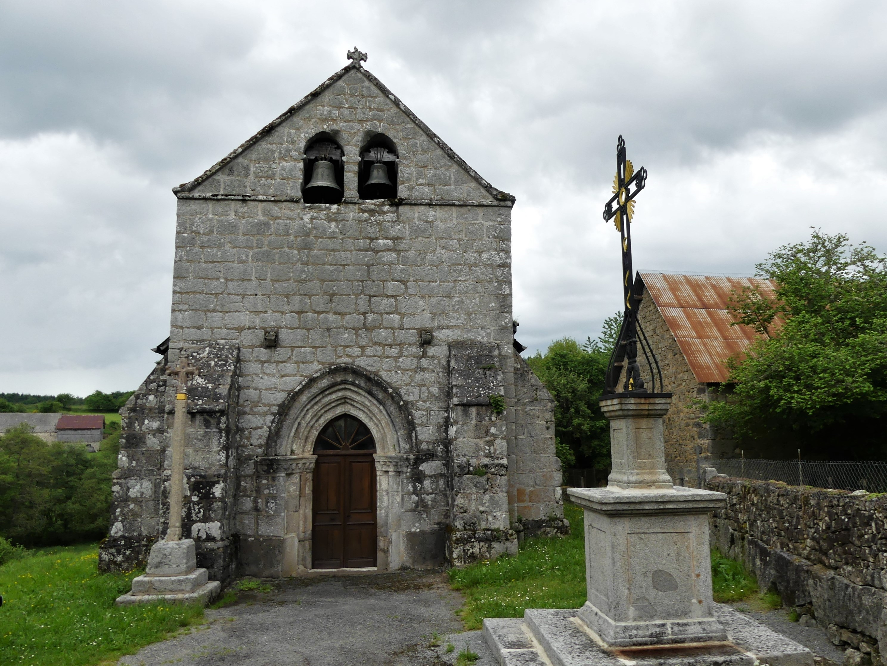 L'église de Beissat, Creuse, France.